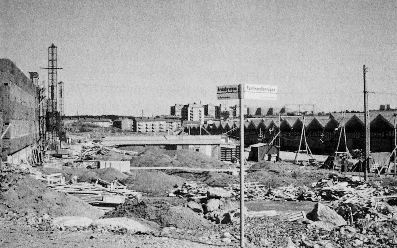 Byggarbeten på Årsta partihallar Brunnbyvägen/Partihandlarvägen med Trädgårdshallen i bakgrunden